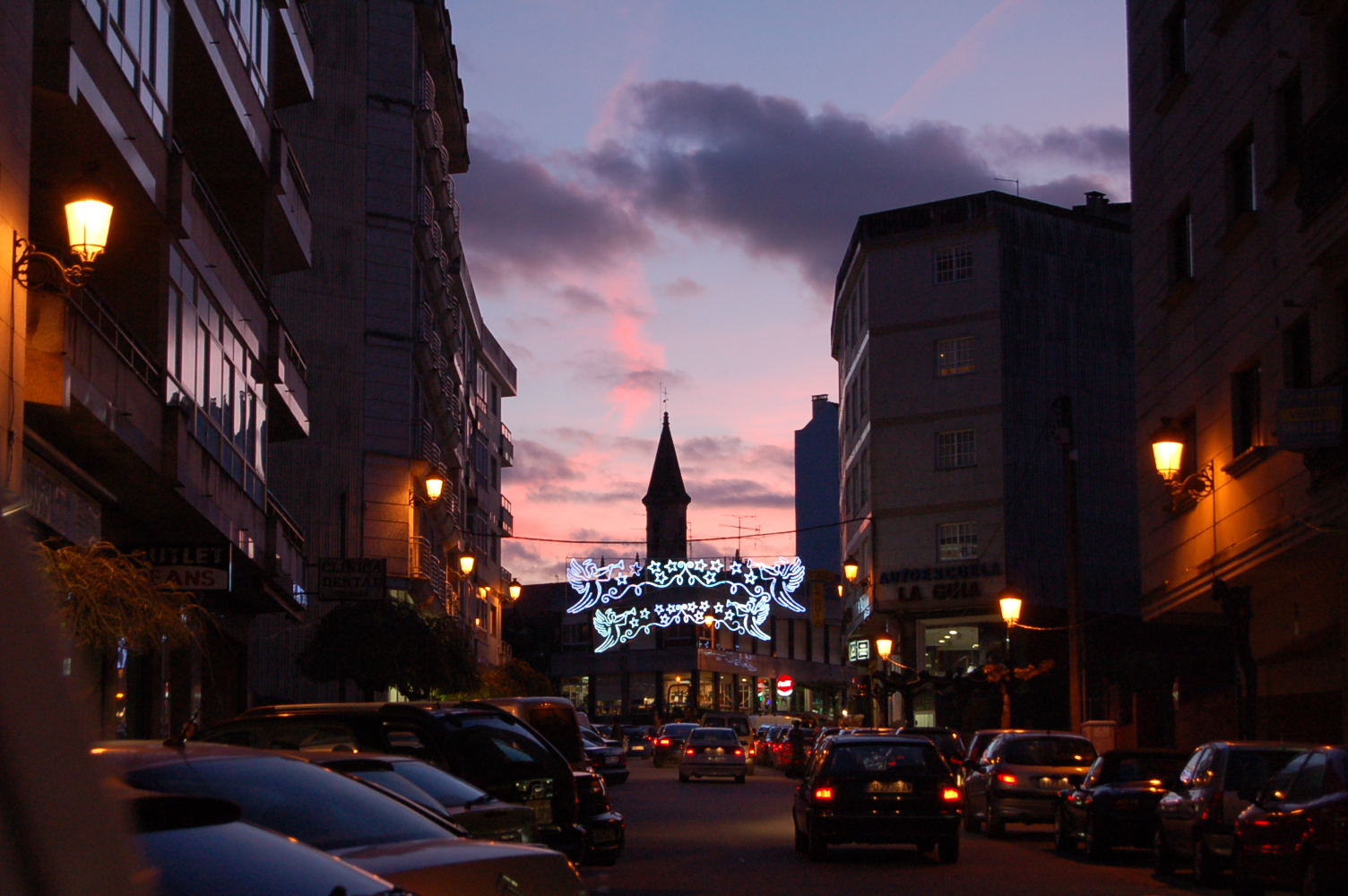 Vista da Igrexa de noite, dende a rua Vidales Tomé.